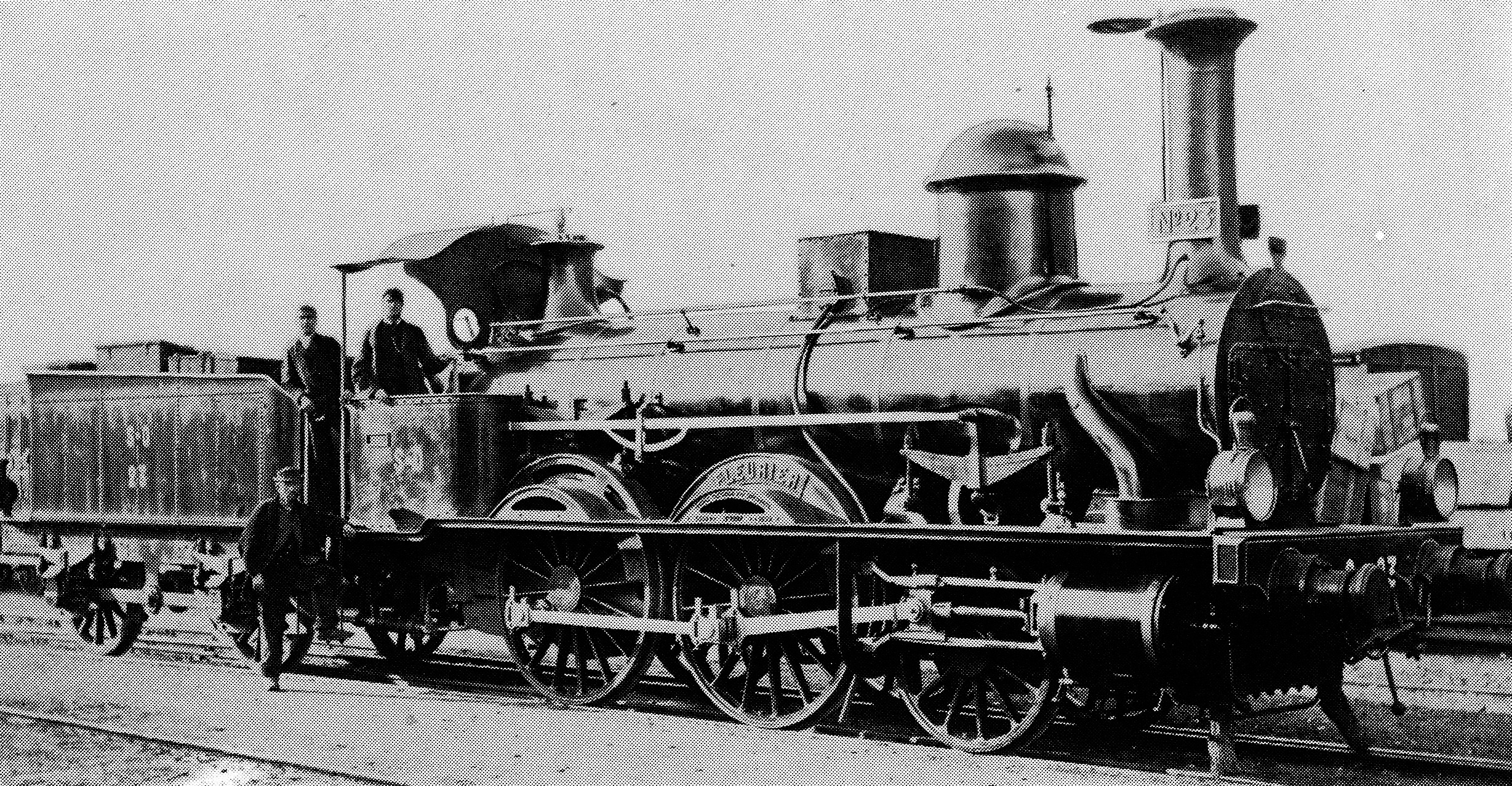 Dampflocomotive II (ab 1887 A2T) Nr. 23 (bis 1871 Nr. 3) Fleurier der Chemins de fer de la Suisſe Occidentale, gebaut 1868 von André Kœchlin & Cie zů Mülhauſen (Fabricationsnr. 1087; Tender Nr. 647), 1881 an die Suisſe-Occidentale-Simplon, 1890 als Nr. 76 von der Jura–Simplon-Bahn übernommen, 1891 mit neuem Keſſel ausgeſtattet, 1903 als B 2/3 Nr. 1076 an die Schweizeriſchen Bundesbahnen, 1907 außer Dienſt geſtellt und anſchließend abgebrochen.